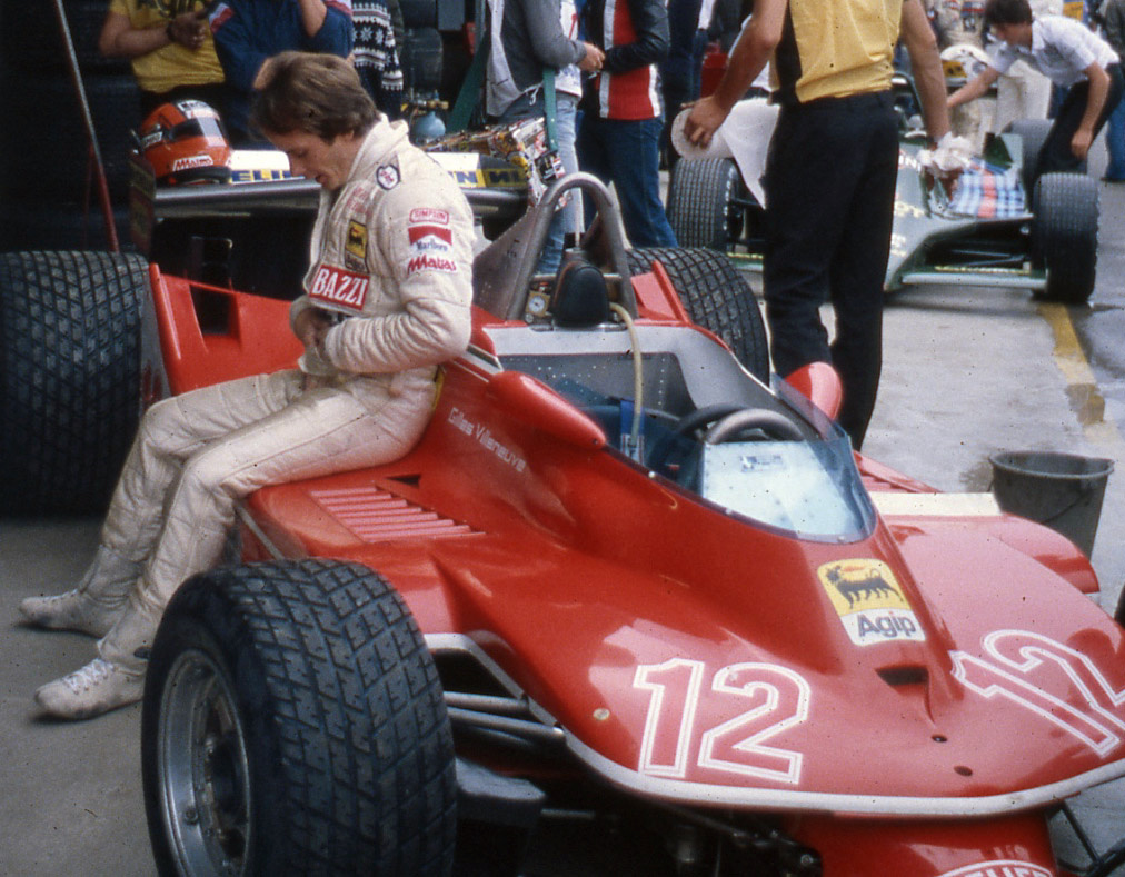 Gilles Villeneuve with his Ferrari 312T4 in Autodromo Enzo e Dino Ferrari, 1979.